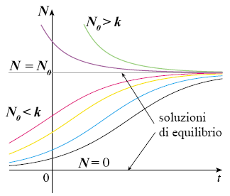 autore: Len zuò descrizione: soluzioni equazione differenziale logistica